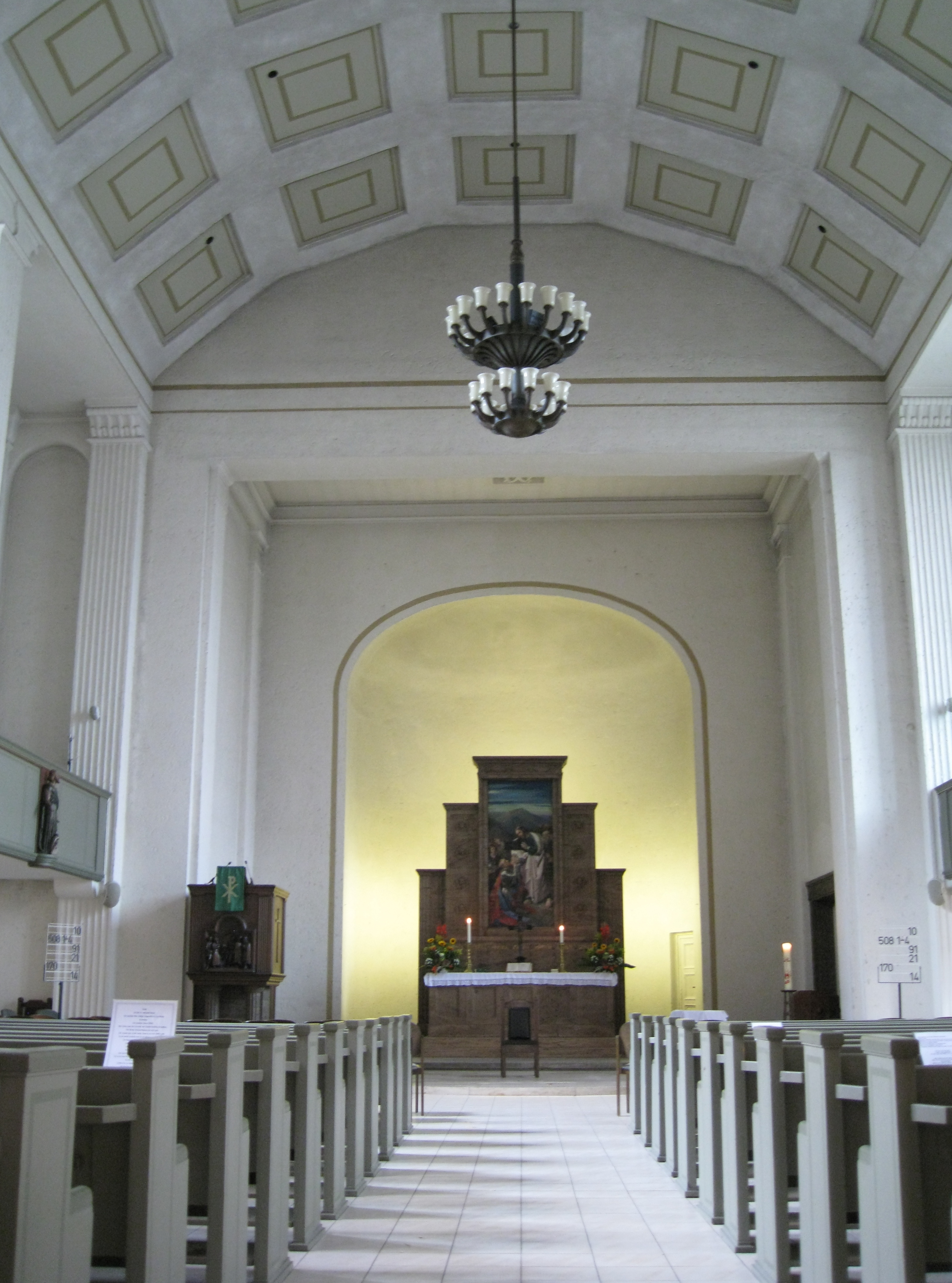 Blick vom Eingang auf den Altar der Glaubenskirche Berlin-Tempelhof